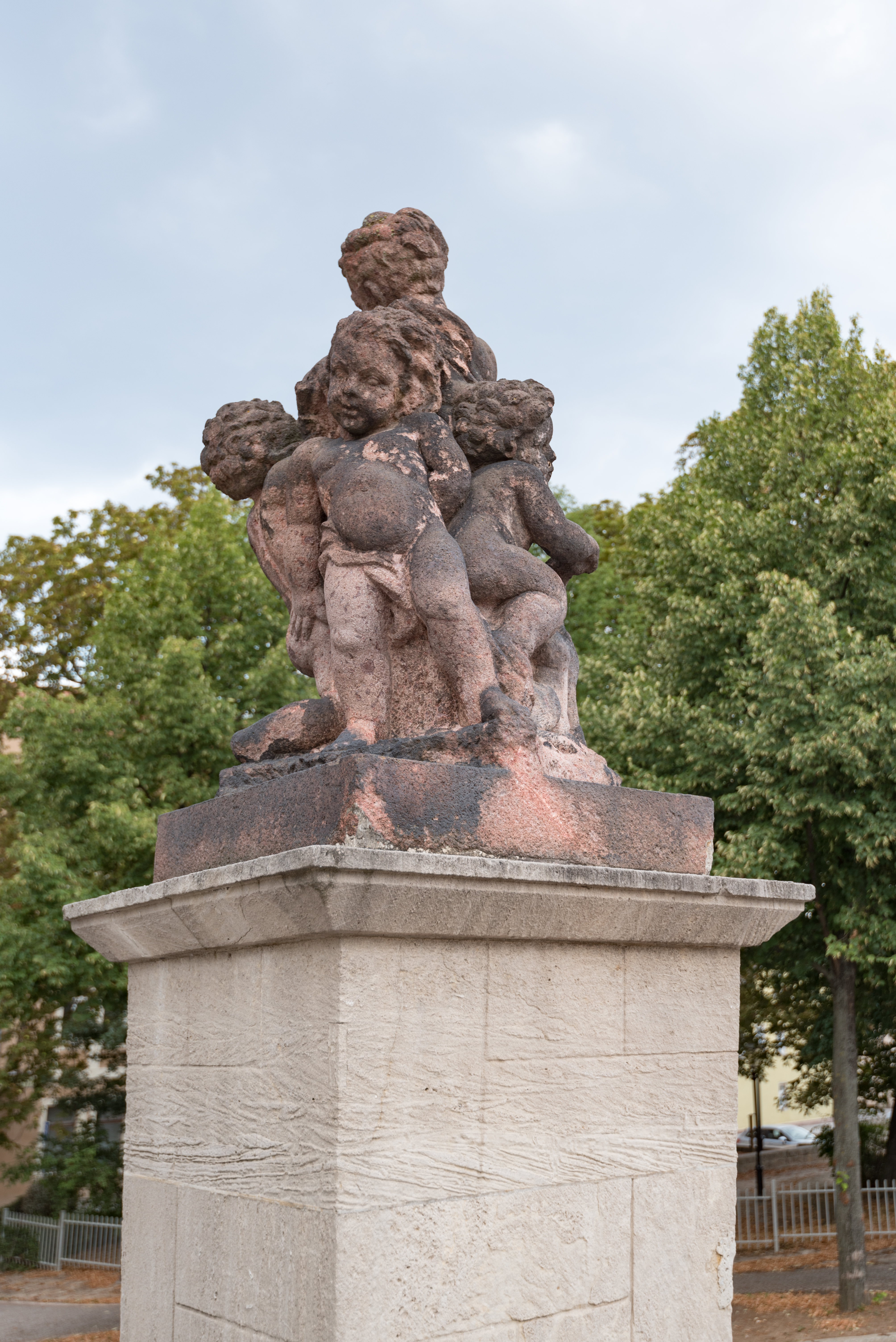 Naumburg (Saale), Wenzelsstraße, Denkmal Spielende Kinder